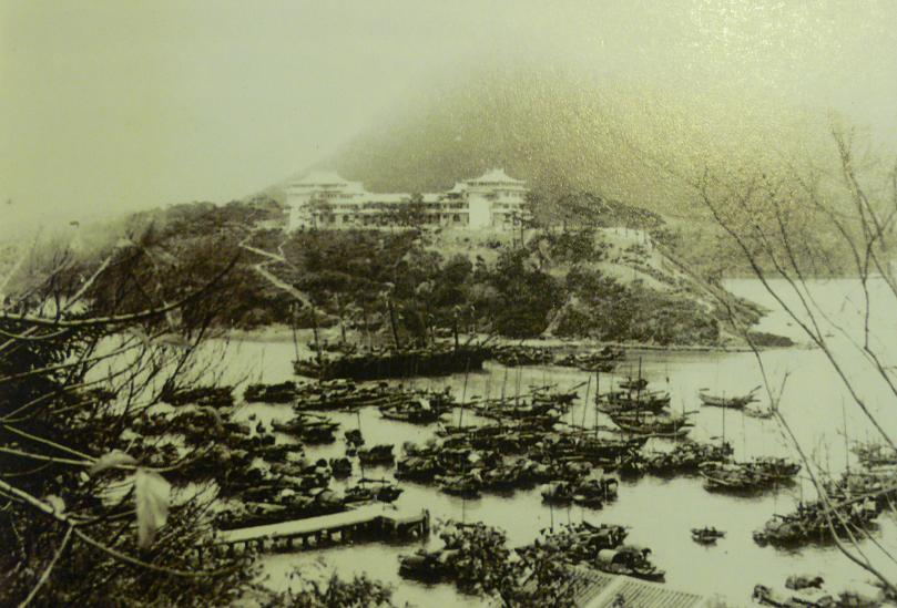 1930年代的zh:華南總修院（今zh:聖神修院） 《南區風物志》引用的圖片 作者不明